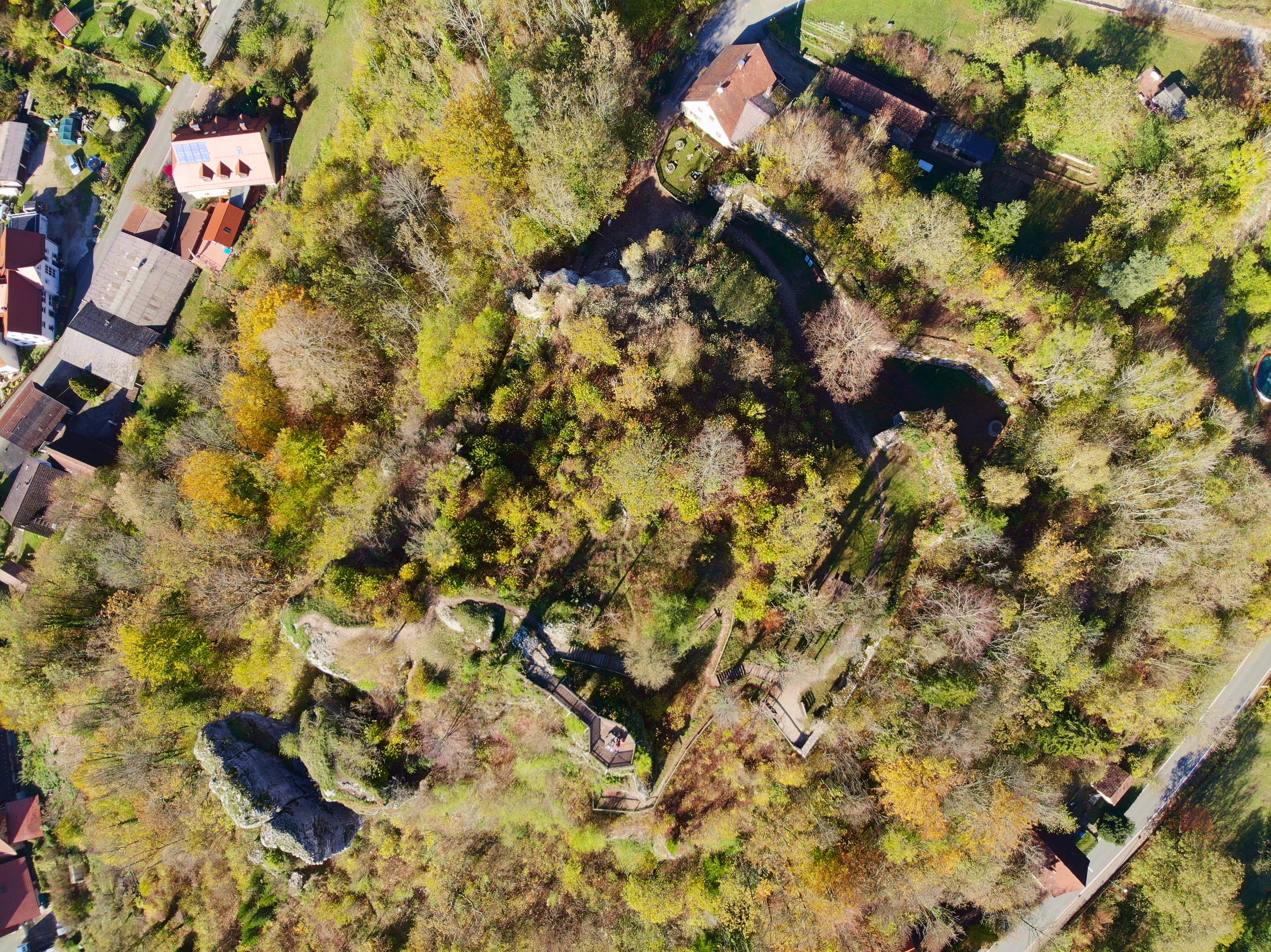 Streitburg Luftaufnahme (2019)